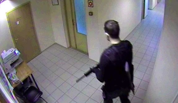 Юрист Дмитрий Виноградов, устроивший стрельбу на территории складов фармацевтической компании на Чермянской улице 7 ноября 2012 года (скриншот с камеры внутреннего видеонаблюдения, установленной на складе фармацевтической компании).